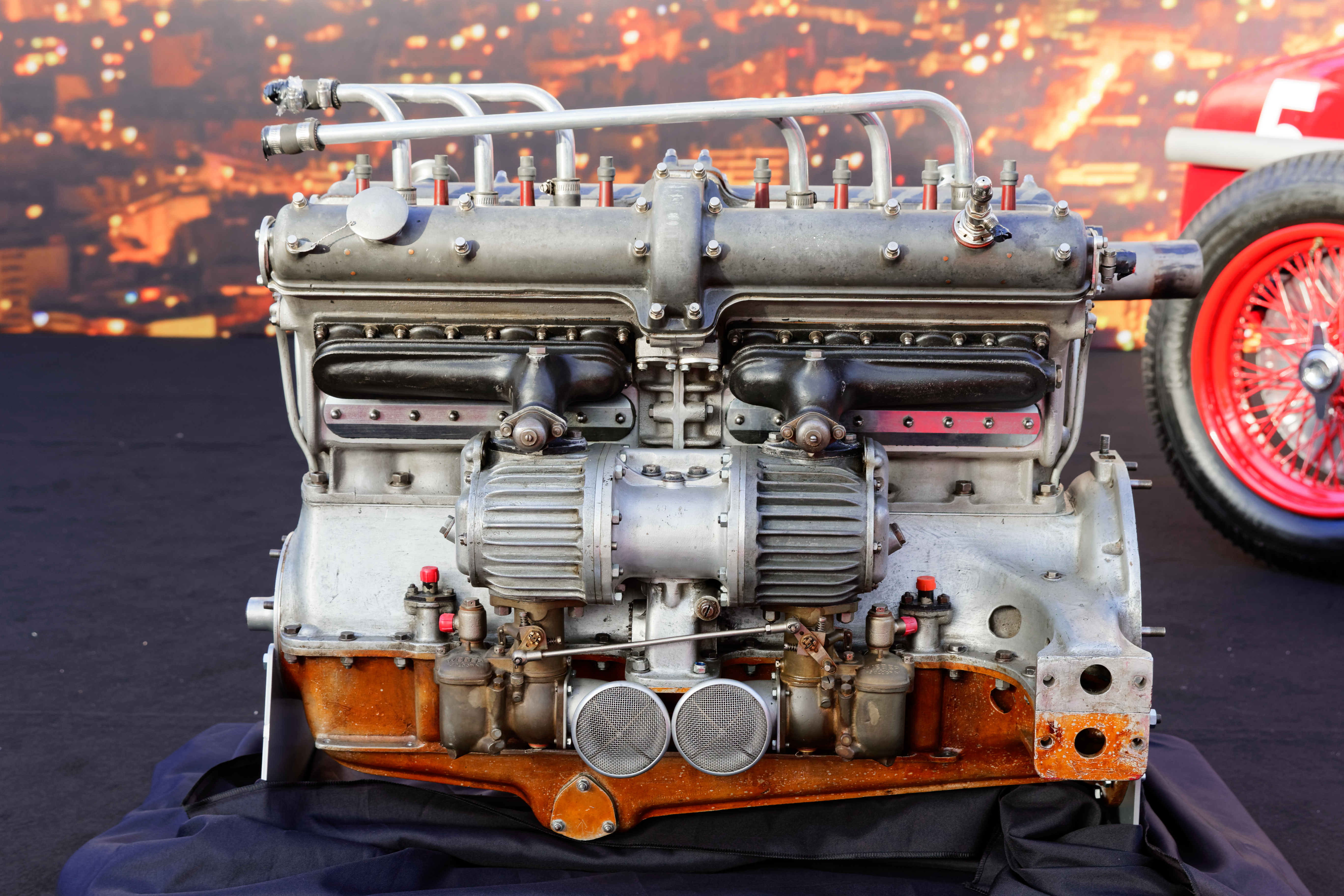 Moteur d'une Alfa Romeo Tipo B P3 de 1934 exposée lors de la vente RM Sotheby’s 2017 aux Invalides à Paris.